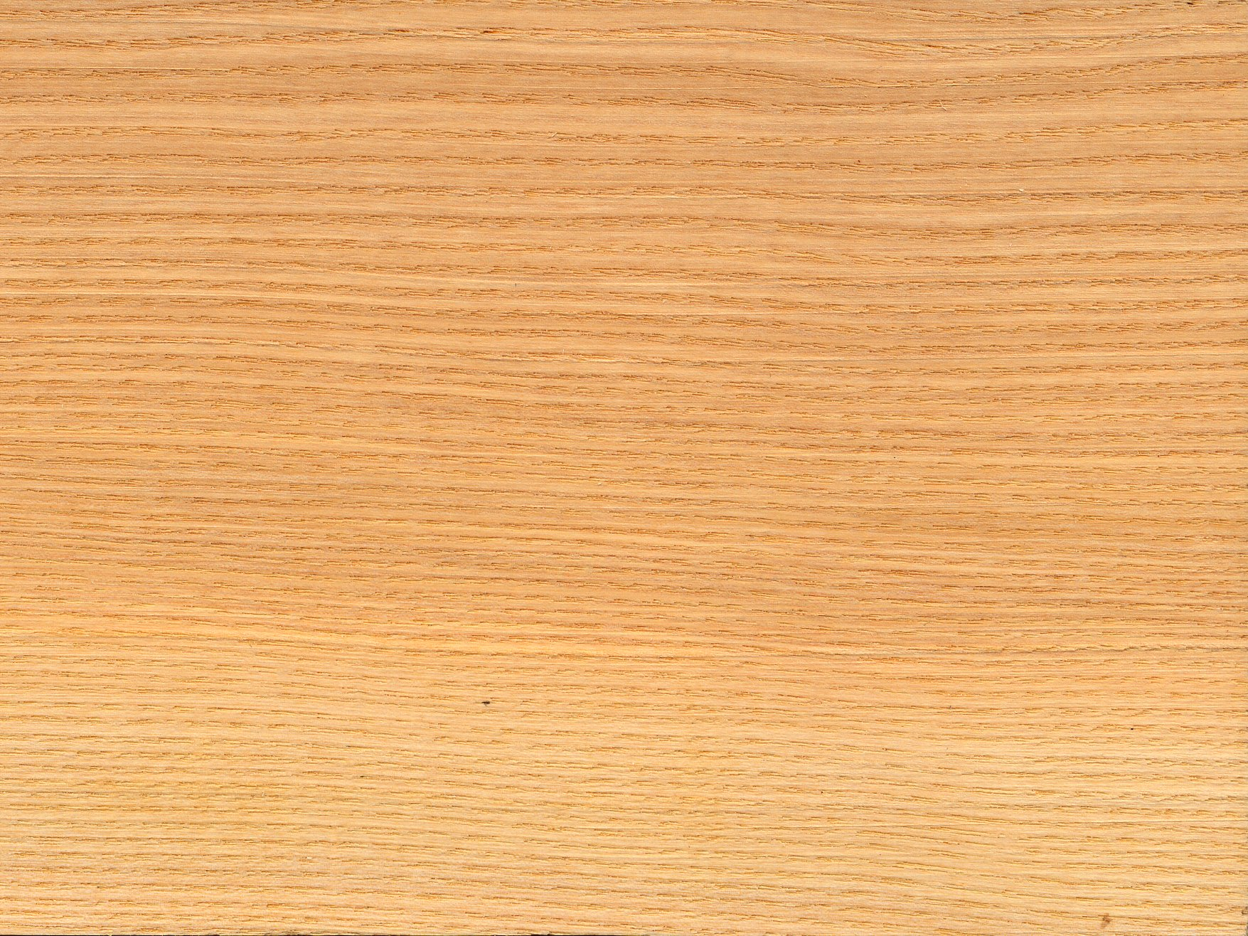 Fraxinus excelsior, przekrój promieniowy przez drewno jesiona wyniosłego